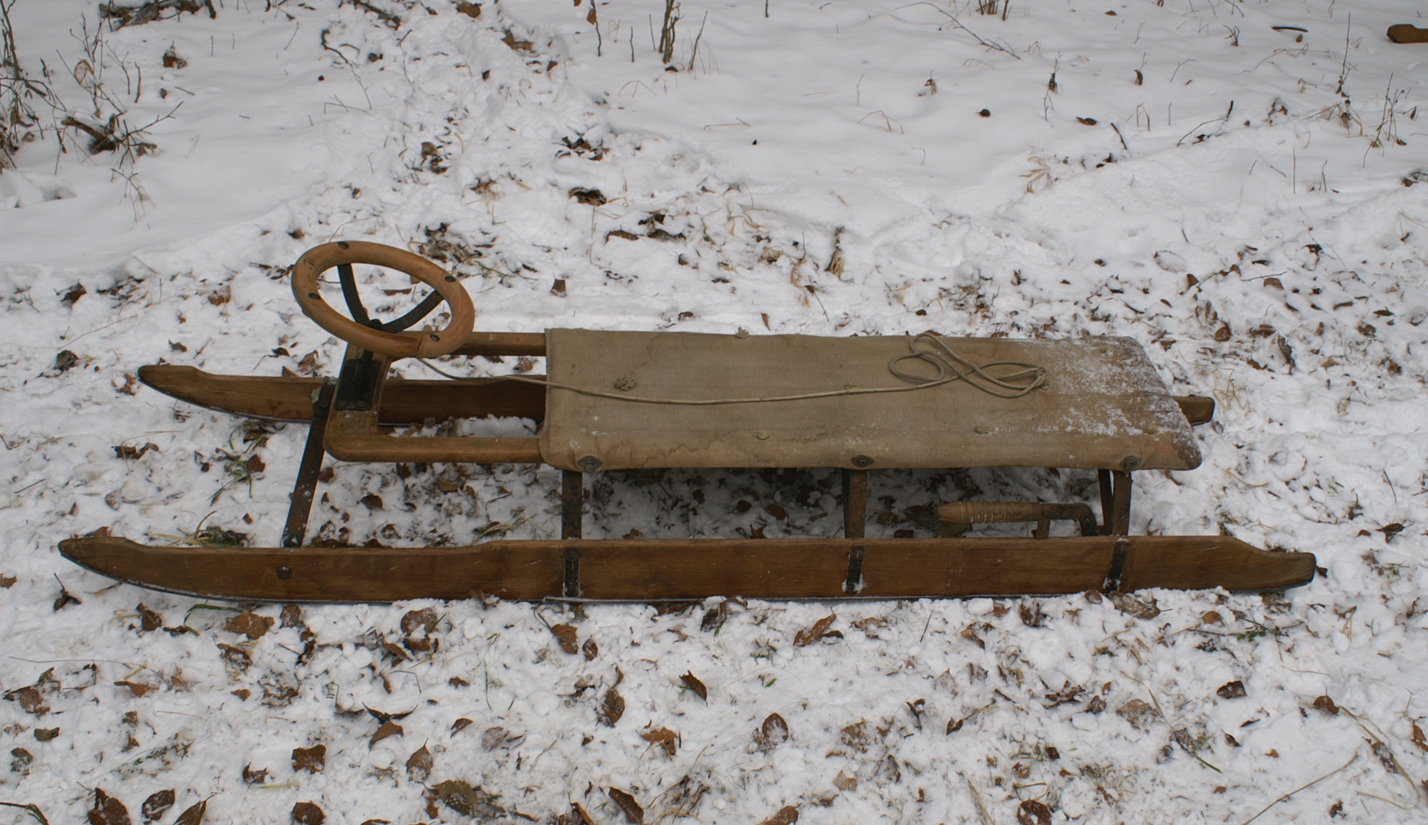 Laut der Patentschrift des Kaiserlichen Patentamtes vom 24.12.1911 ist der Patenter ein lenkbarer Rodelschlitten mit elastischen Kufen, deren Vorderteil beim Lenken seitlich abgebogen wird. In Gerhausen im Alb-Donau-Kreis findet alljährlich ein Rennen mit diesen historischen Spezialschlitten statt.